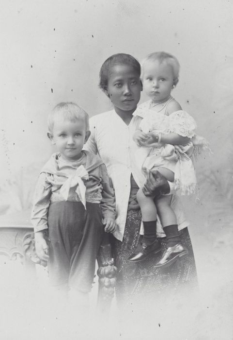 Foto. 'Baboe' Minah met Jantje van drie jaar oud en Agnes van 1,5 jaar oud, Soerabaya